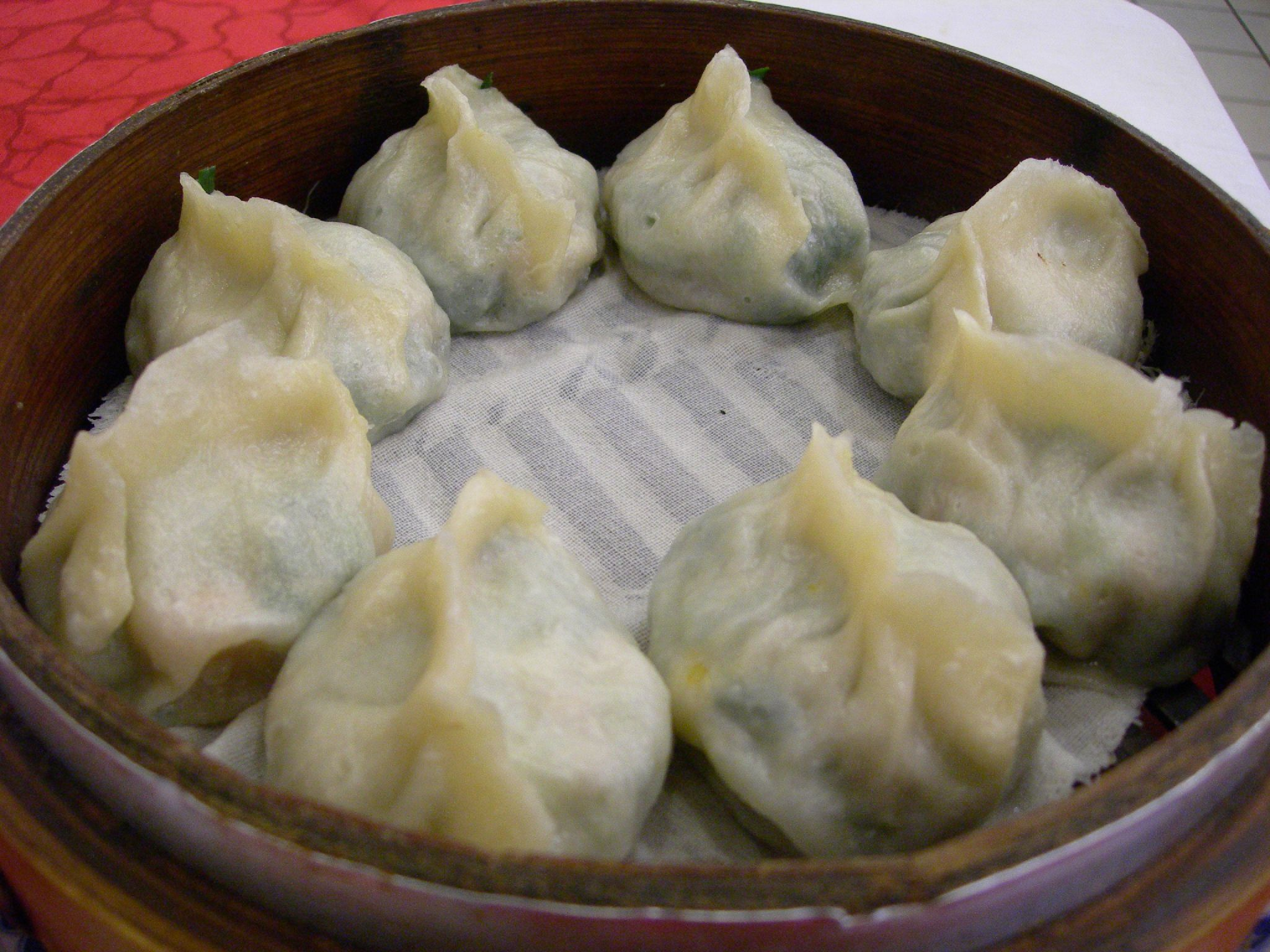 臺北市萬華區峨眉街，一條龍餃子館販售的韭菜蝦仁蒸餃。